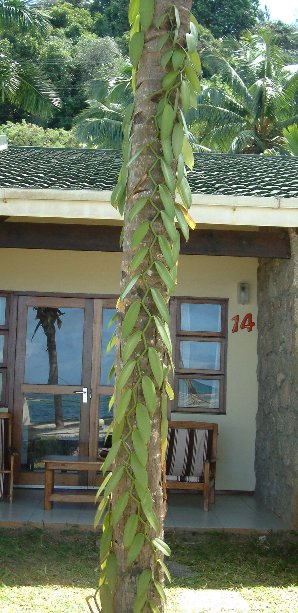 Vanille, Orchideengewächs; Lizenzstatus GNU-FDL, Bildquelle: Privatfoto Esskay